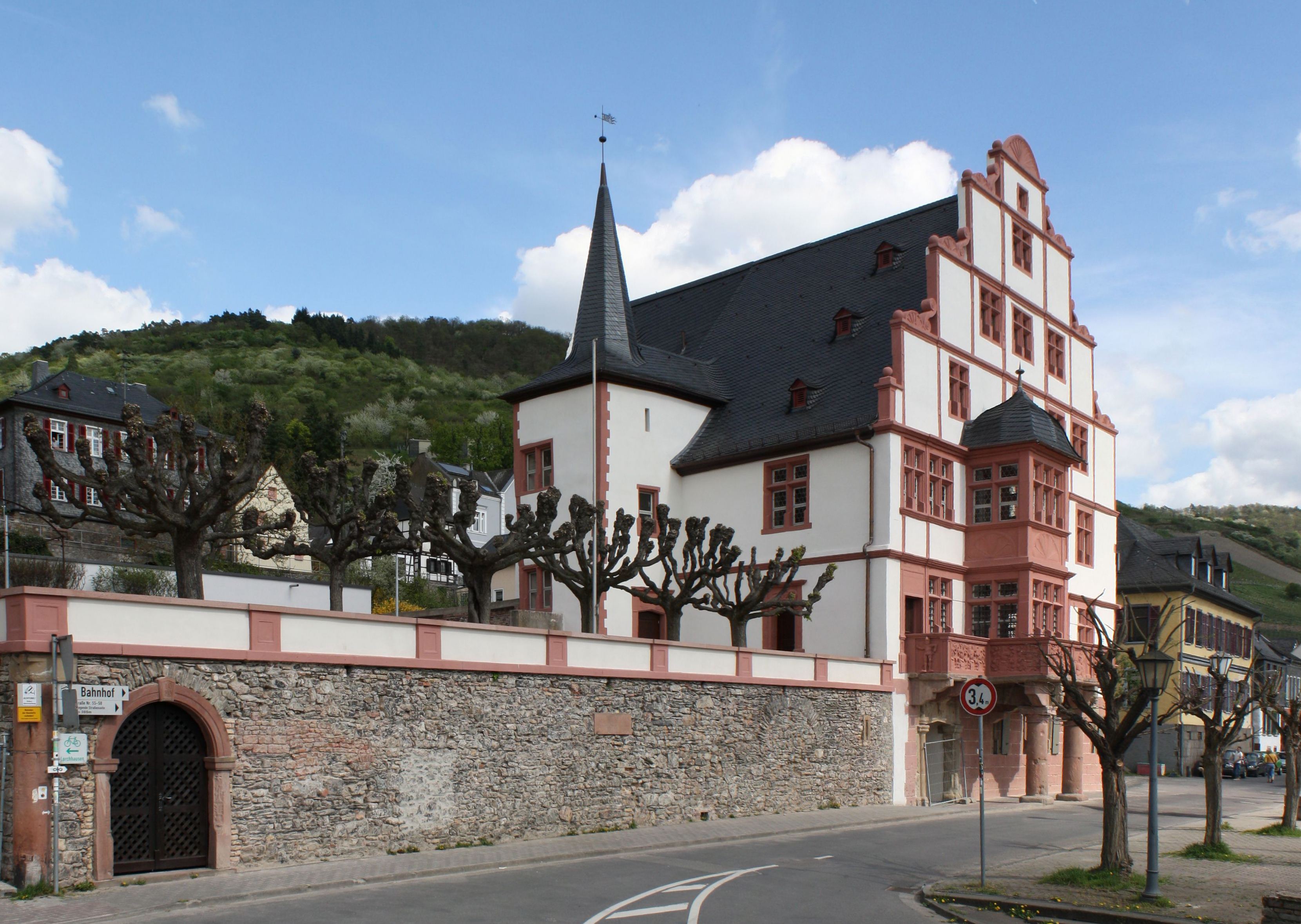 Hilchenhaus in Lorch (Rhein) nach der Sanierung